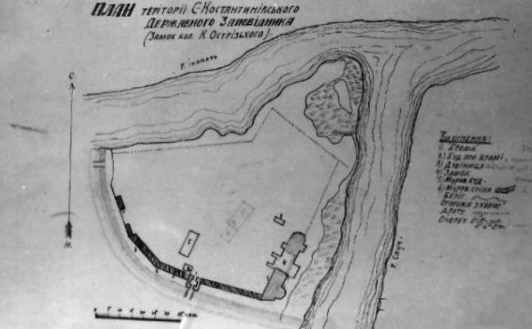 План теріторіі С-Костянтинівського державного заповідника (замок кол. К. Острізького).